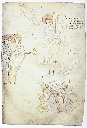 Жінки-мироносиці, янгол і поснула варта. Мініатюра Лавришівського євангелія. Фол. 29.